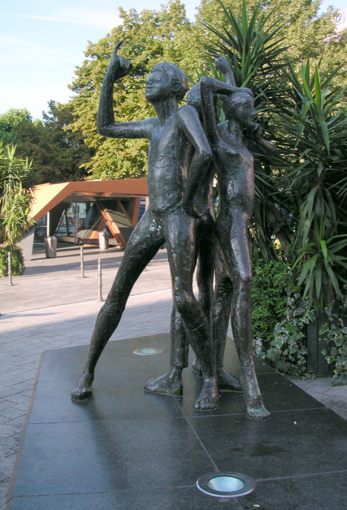 Aachen, Klenkes-Denkmal (1970) am Holzgraben bzw Peterstraße, Ecke Ursulinerstraße, Bildhauer: Hubert Löneke